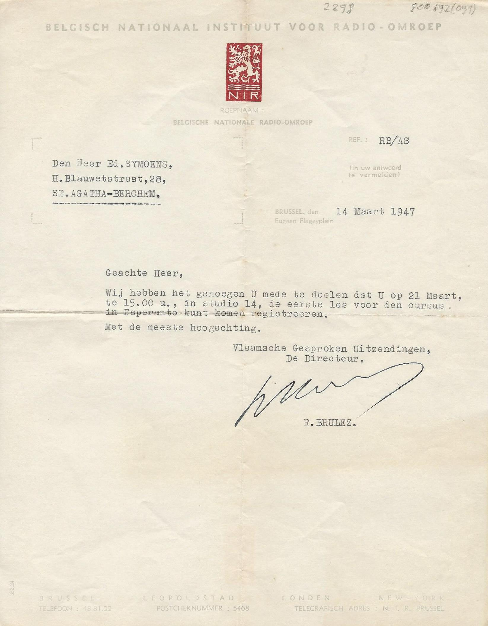 Letero al Edward Symoens (1915-1995)